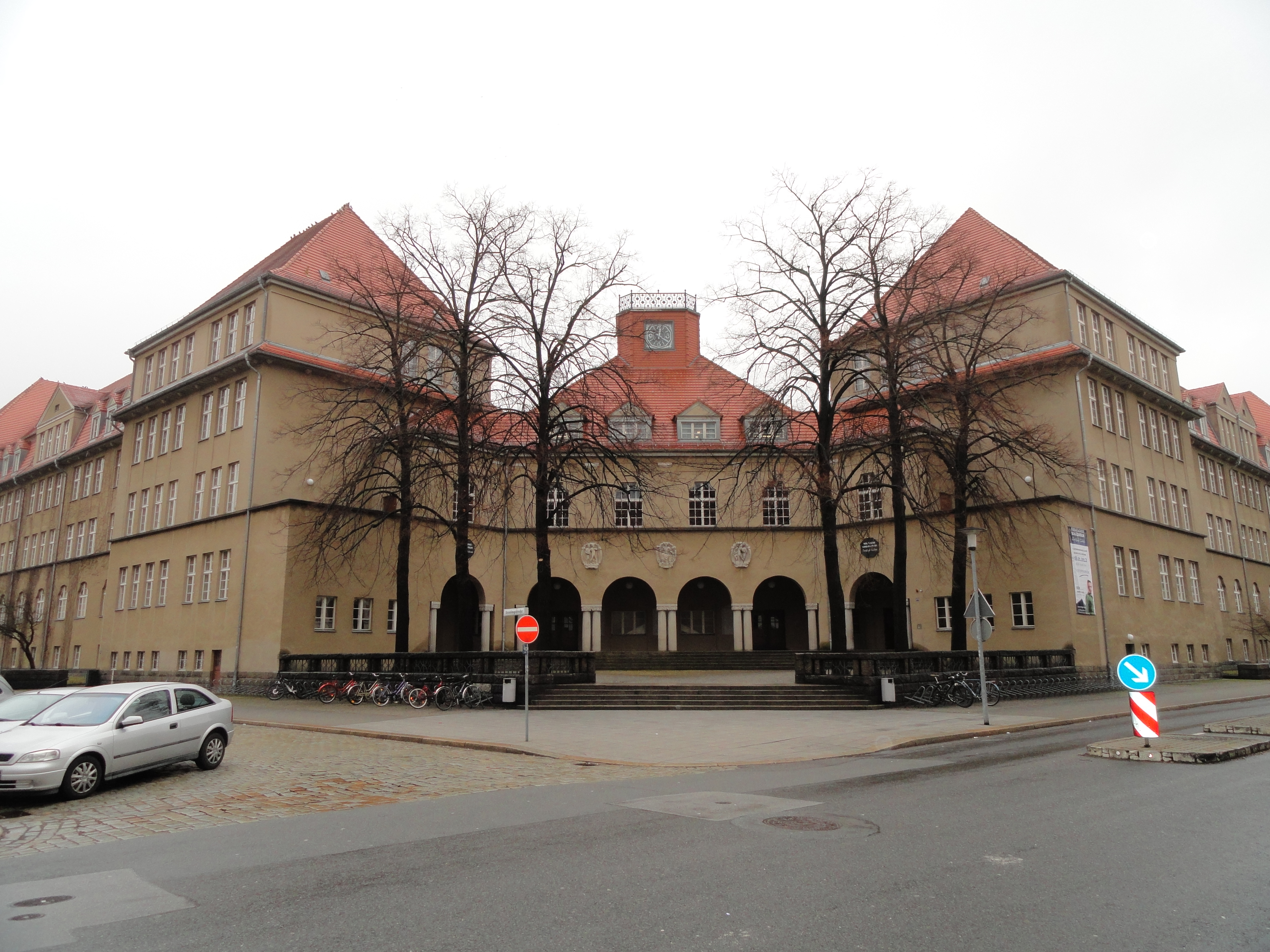 Berufsschulzentrum Christoph-Lüders in Görlitz